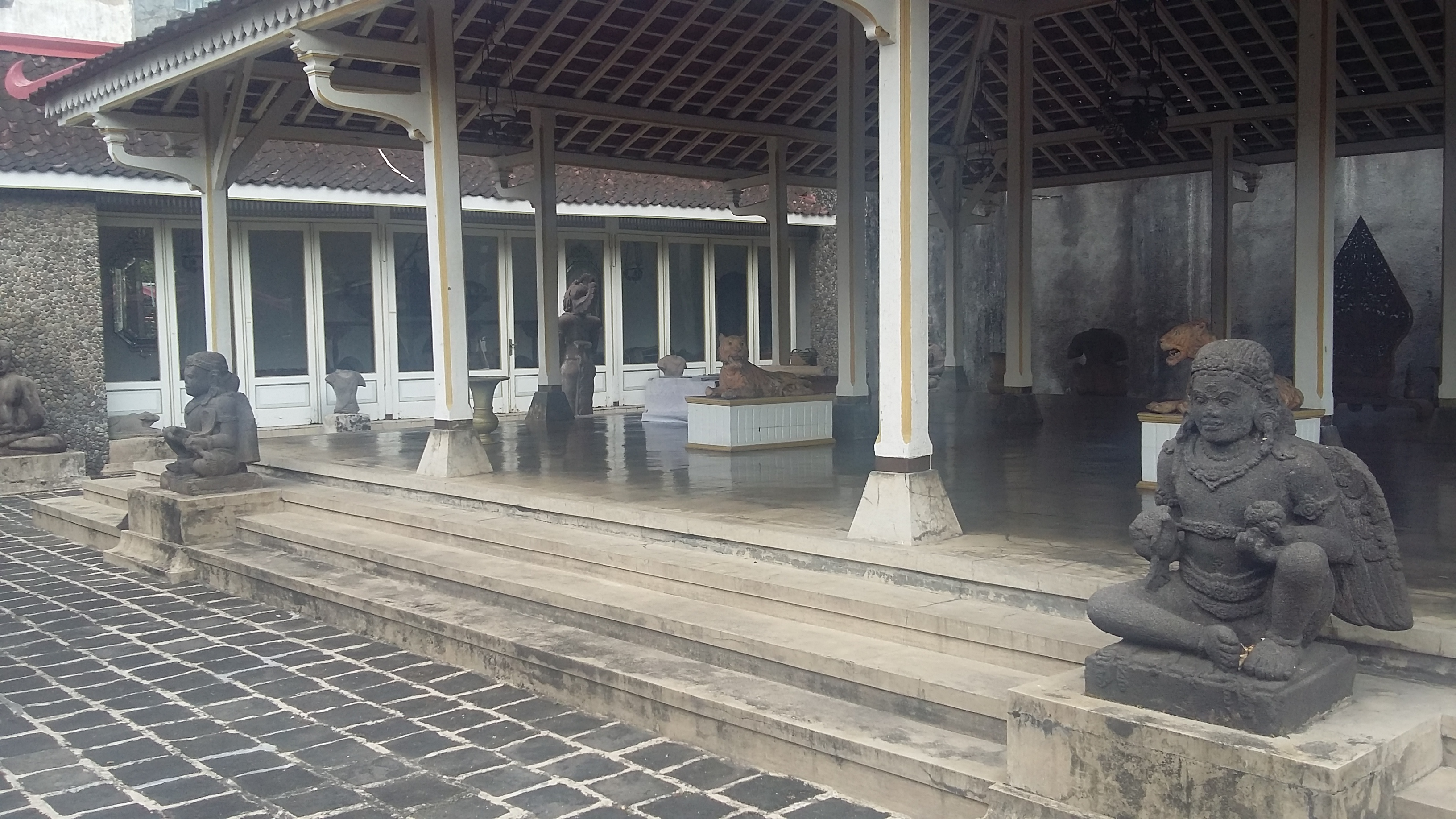 La maison de Go Tik Swan, plus connu sous le nome de K. R. T. Hardjonagoro, à Surakarta, Java, Indonésie